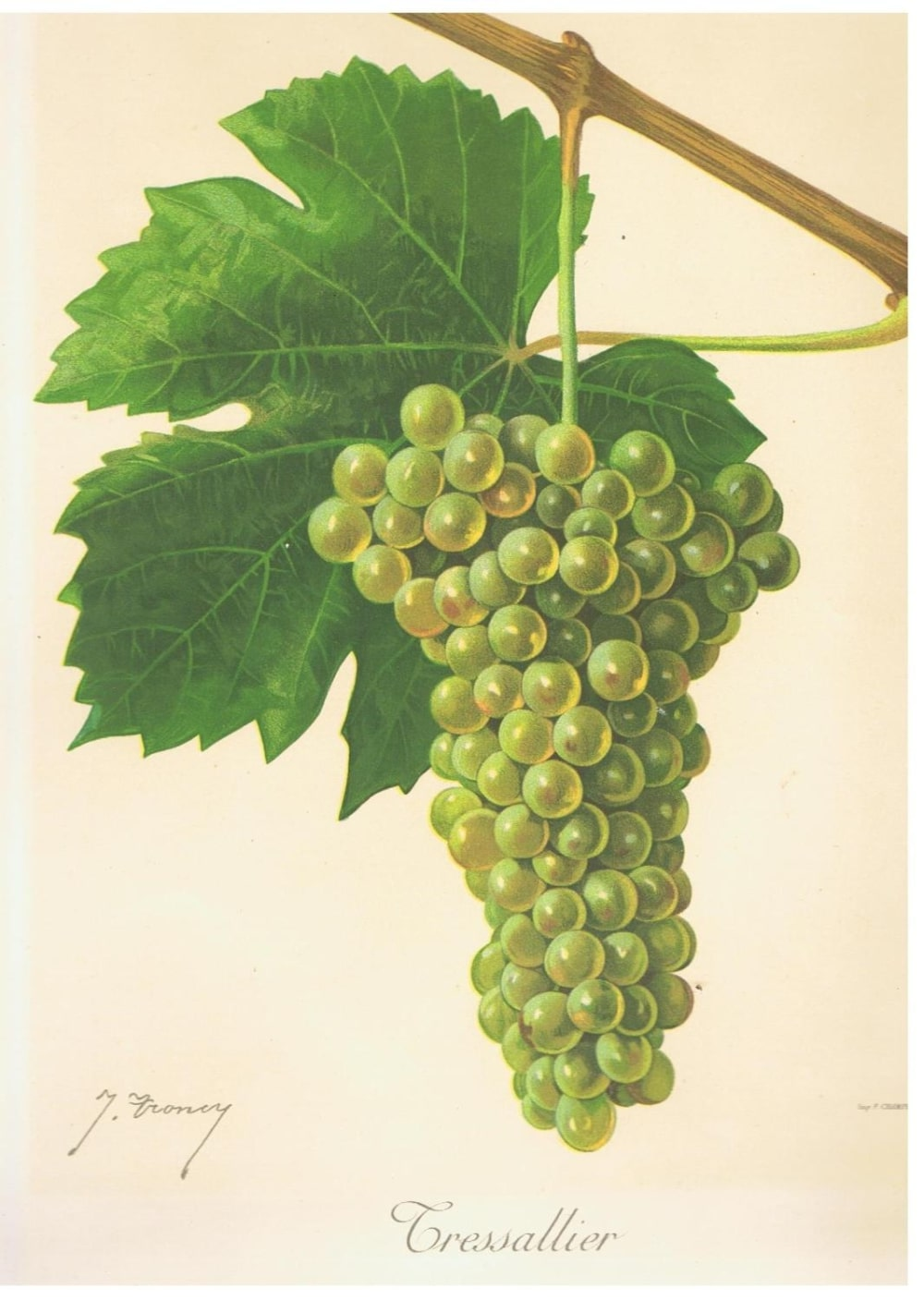 Illustration du cépage Tressallier par Jules Troncy dans l'ouvrage "Ampélographie : traité général de viticulture" publié sous la direction de P. Viala & V. Vermorel avec la collaboration de A. Bacon, A. Barbier, A. Berget [et al.] - Date de l'édition originale : 1901-1910